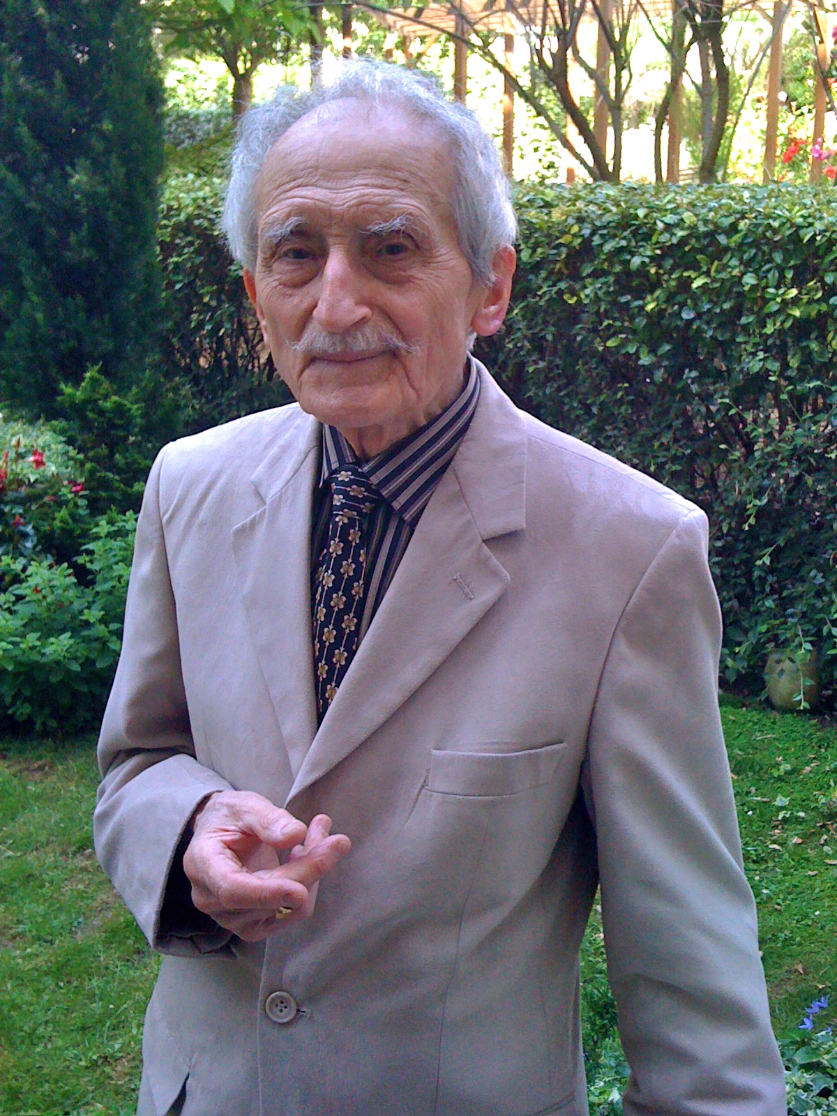 Lucien Jerphagnon